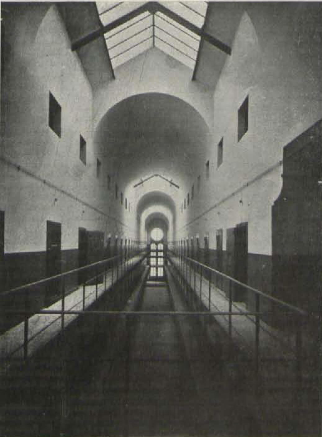 Nueva cárcel celular construida en Barcelona, galería.